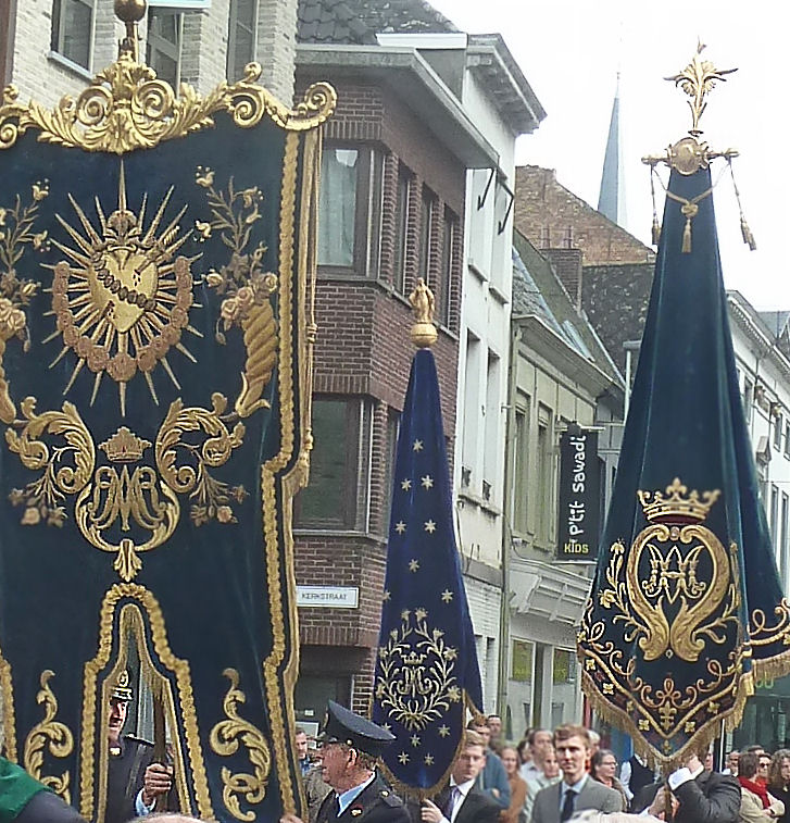 Sanctus Gummarus Lyrmensis